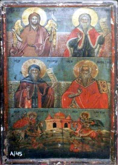 Άγιος Ιωάννης και προφήτης Ηλίας - άγιοι Αντώνιος και Χαράλαμπος - άγιοι Γεώργιος και Δημήτριος, Παναγία Λαγουδιανή, Θεσσαλονίκη